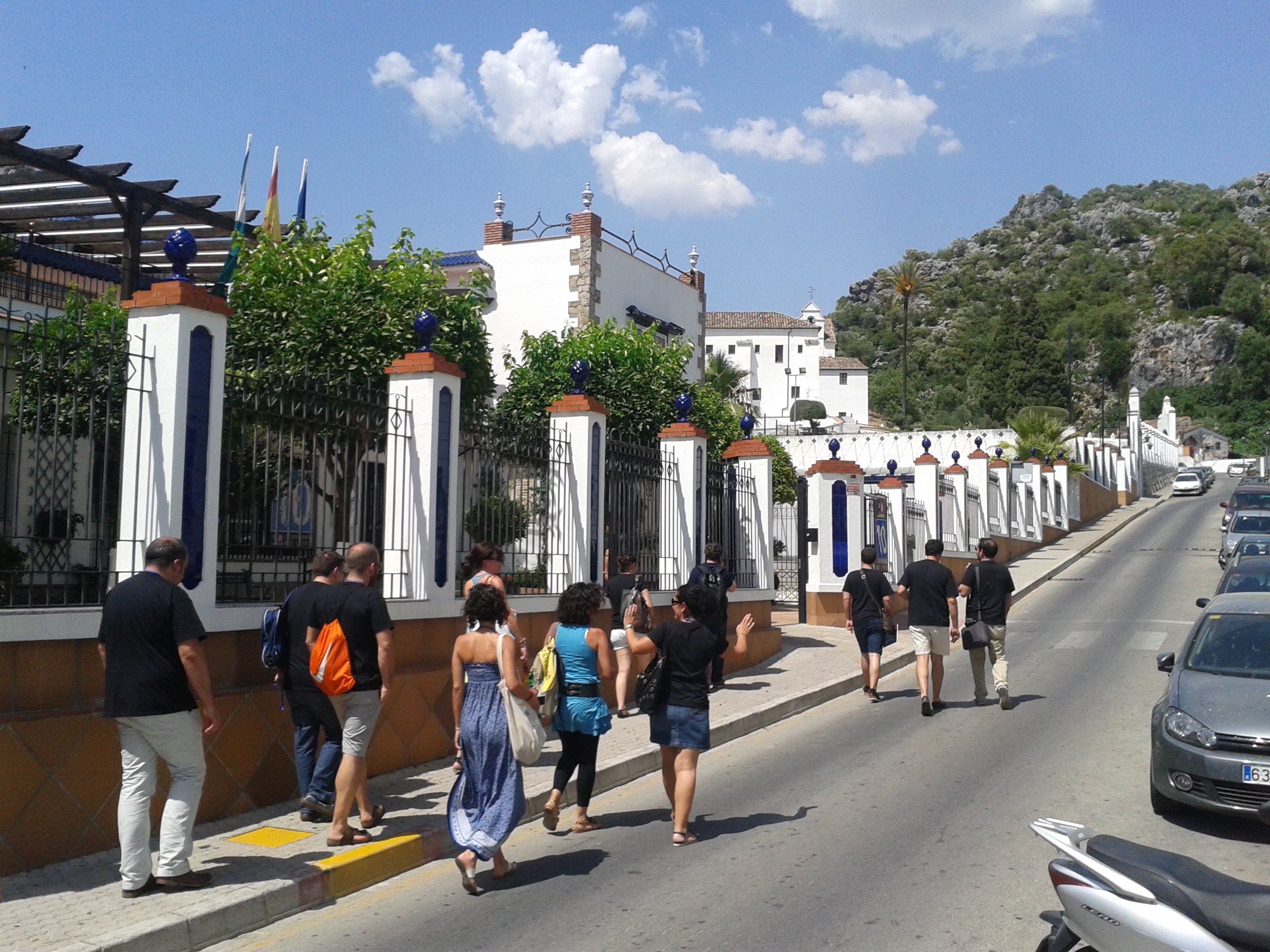 Ubrique, encuentro AulaBlog 2015 en el Instituto de Educación Secundaria Nuestra Señora de los Remedio